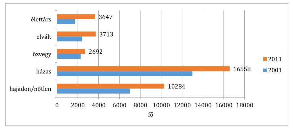 Dunakeszi lakosságának családi állapot szerinti bontása (2001-2011)